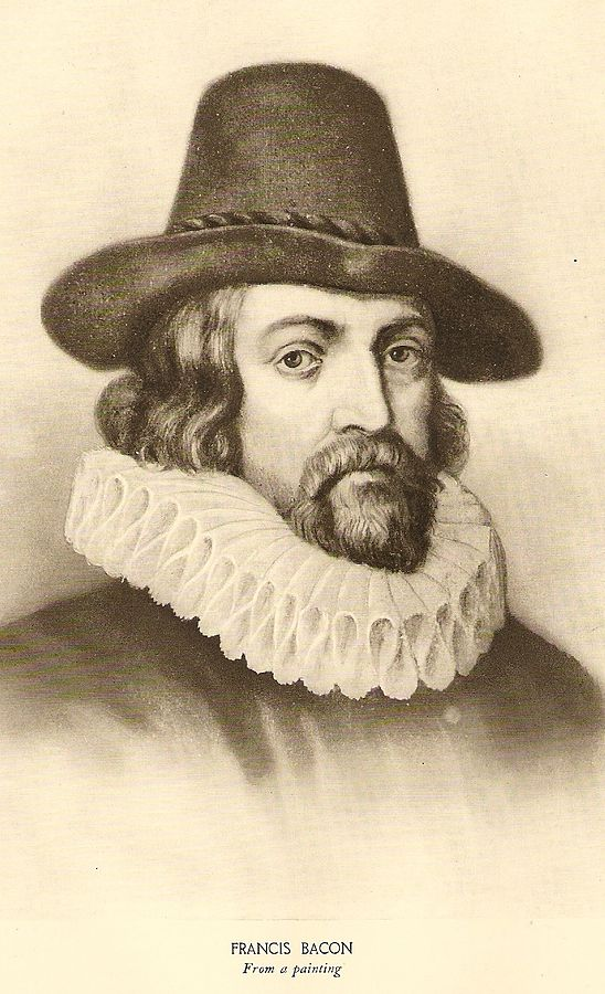 স্যার ফ্রান্সিস বেকন "জ্ঞানই শক্তি"